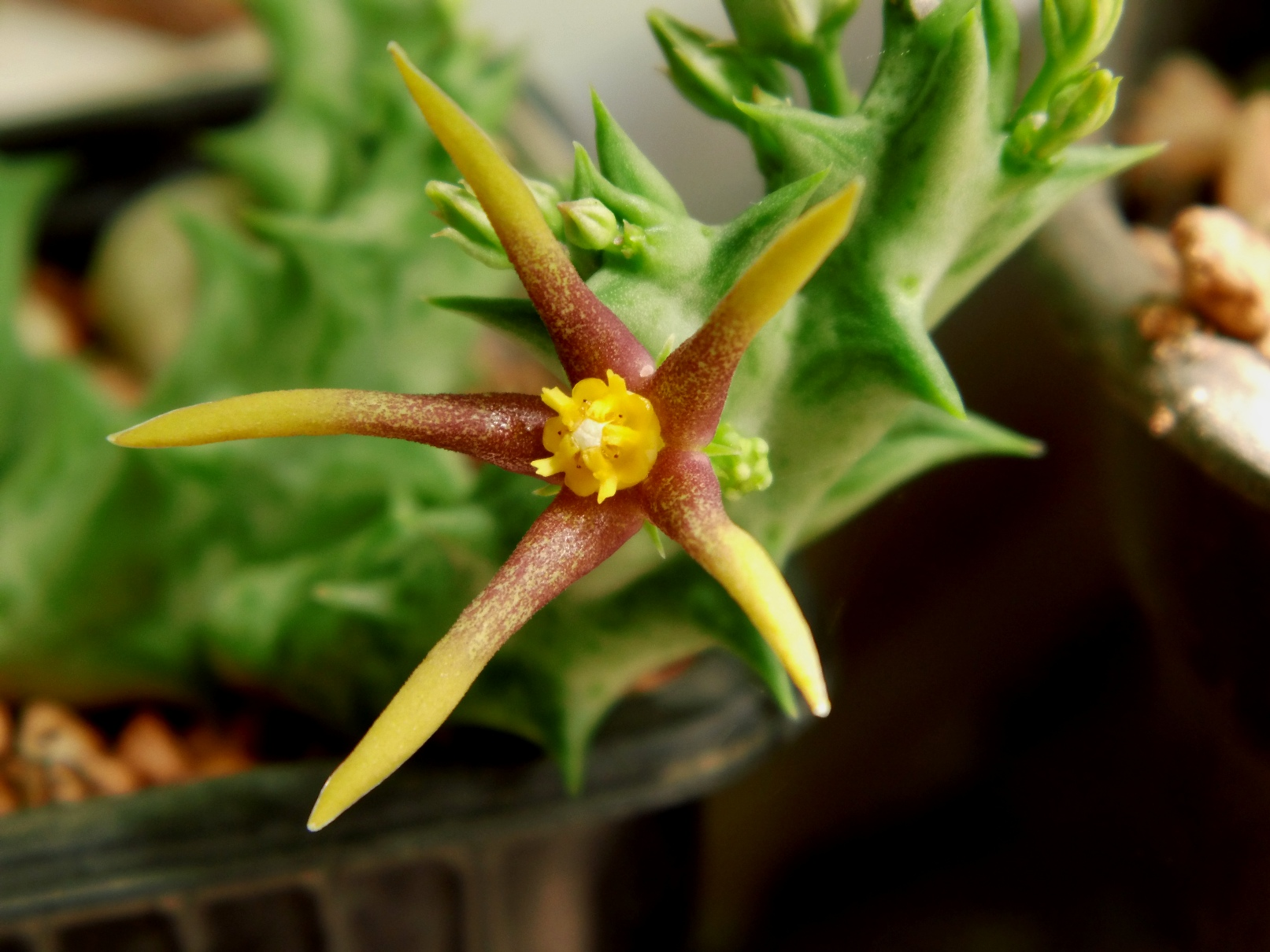 Orbea flower